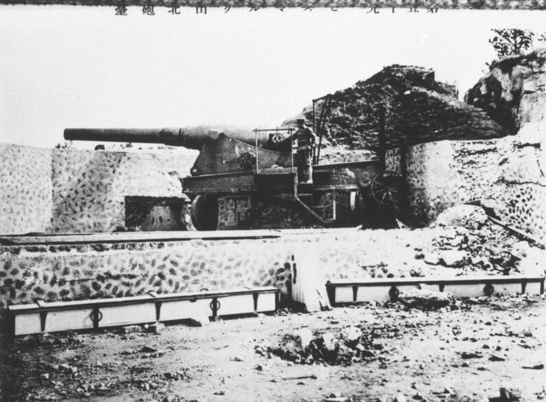 Schutzgebiet Kiautschou 1. Weltkrieg 21 cm Geschütz von den Japanern erbeutet